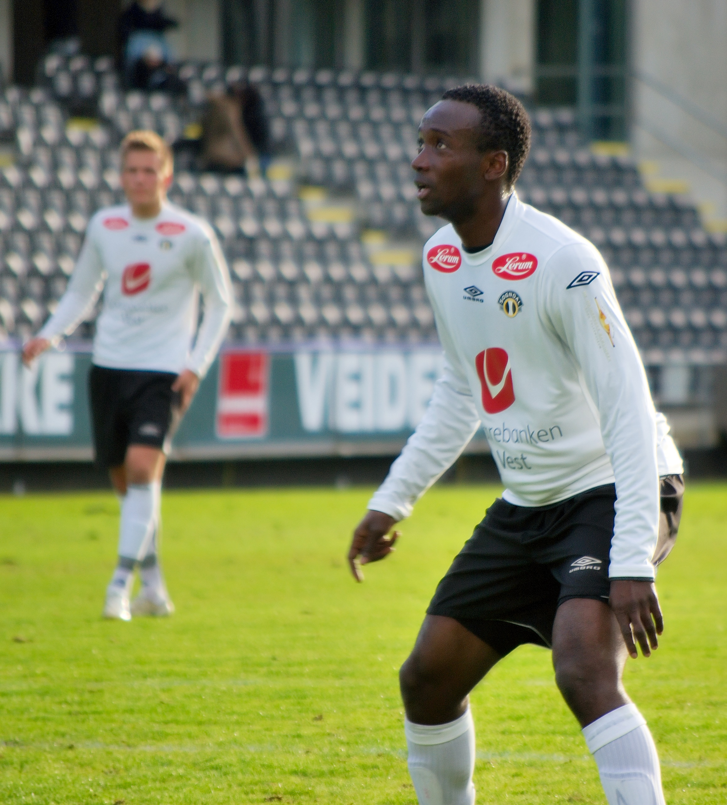 Ahyee Aye Elvis